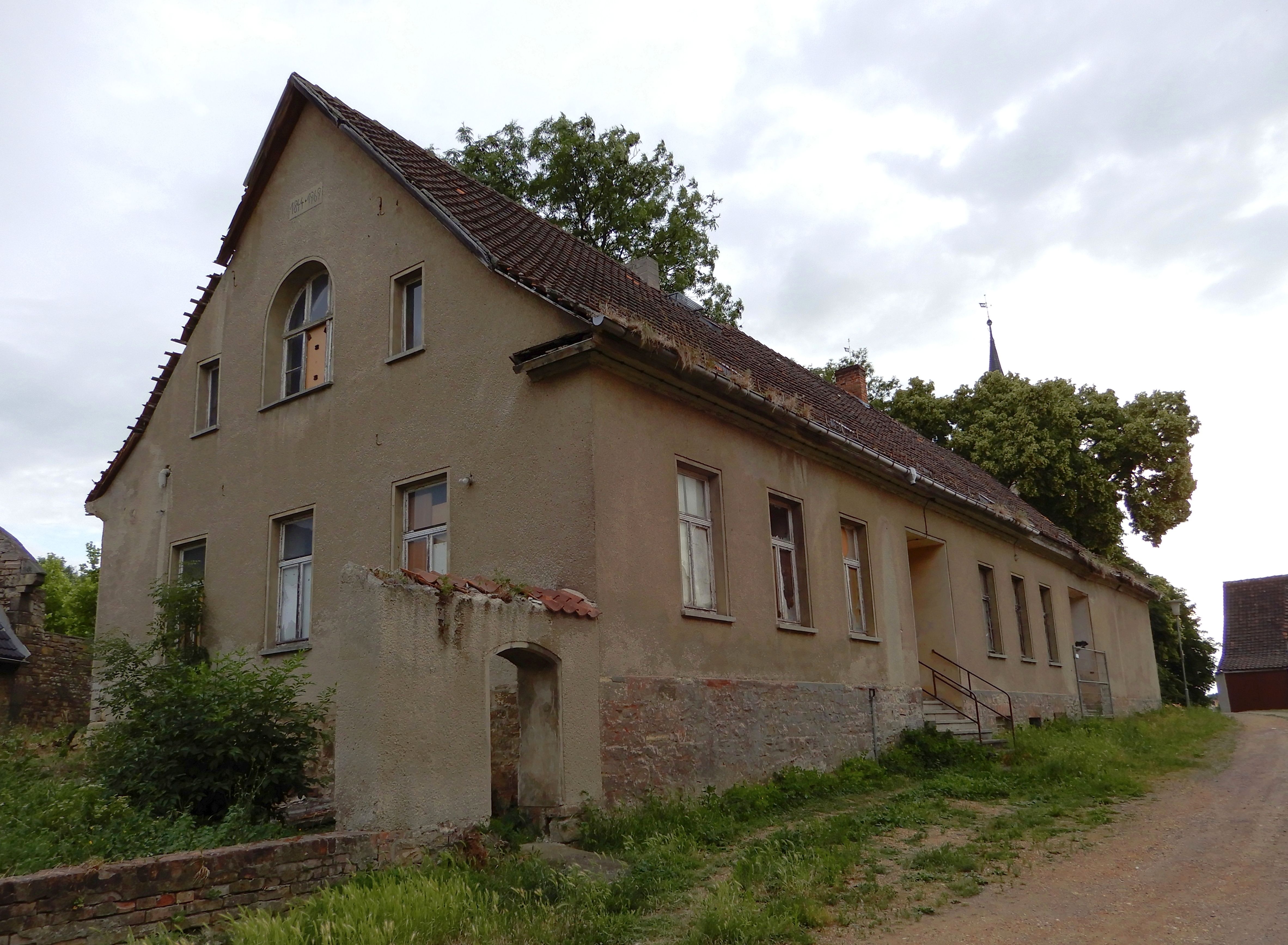 Alte Schule von 1844 auf dem Kirchberg